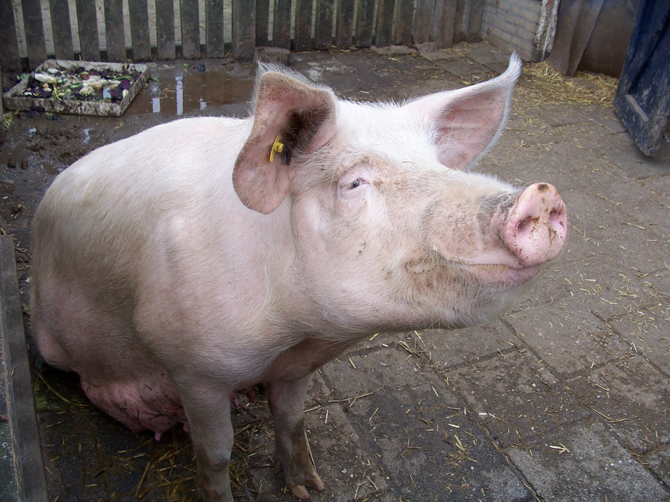 A pig